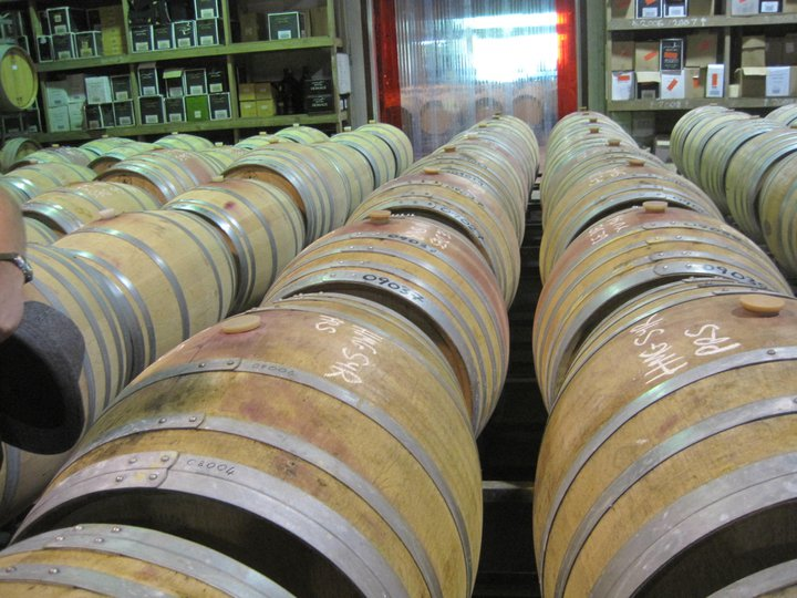 Took myself